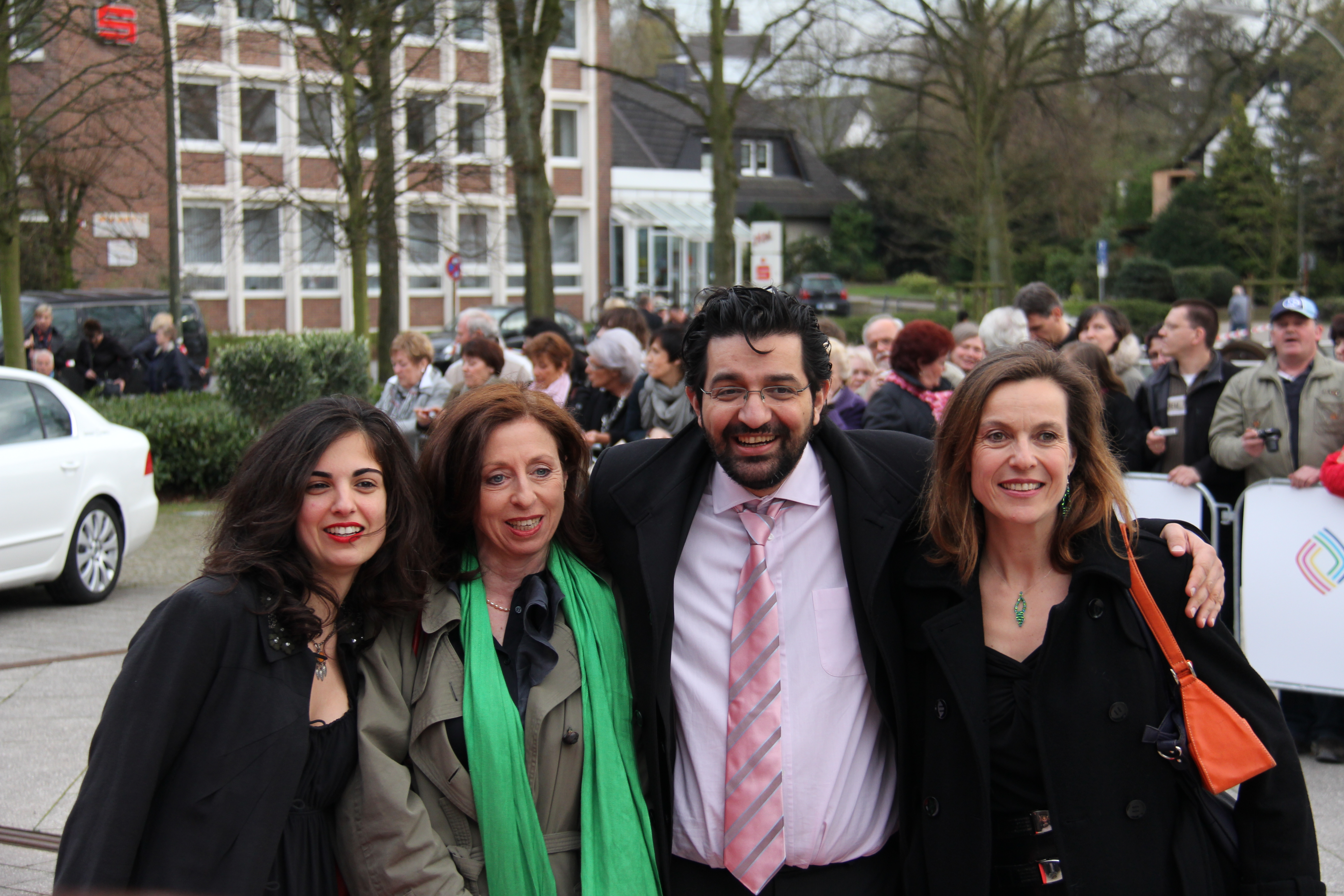 Team des Grimme-Preisträgers Ali Samadi Ahadi (Iran: Election 2009) bei der Verleihung 2011